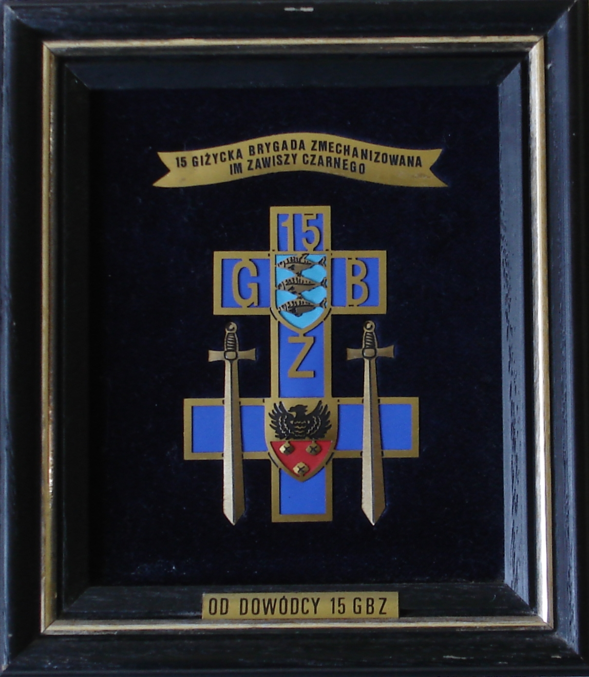 Ryngraf 15 Brygady Zmechanizowanej